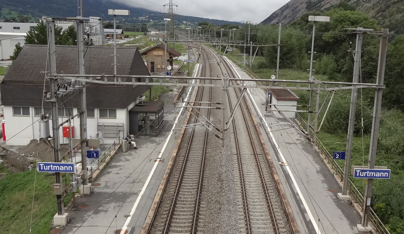 Gare de Tourtemagne.